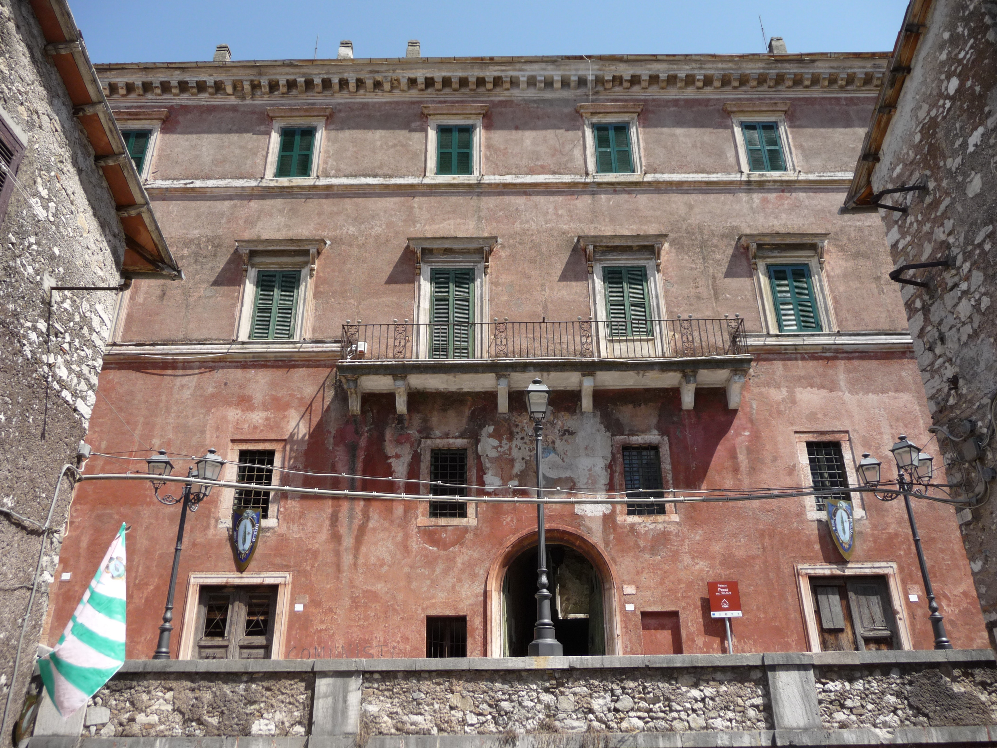 Palazzo Pecci dove nacque Papa Leone XIII